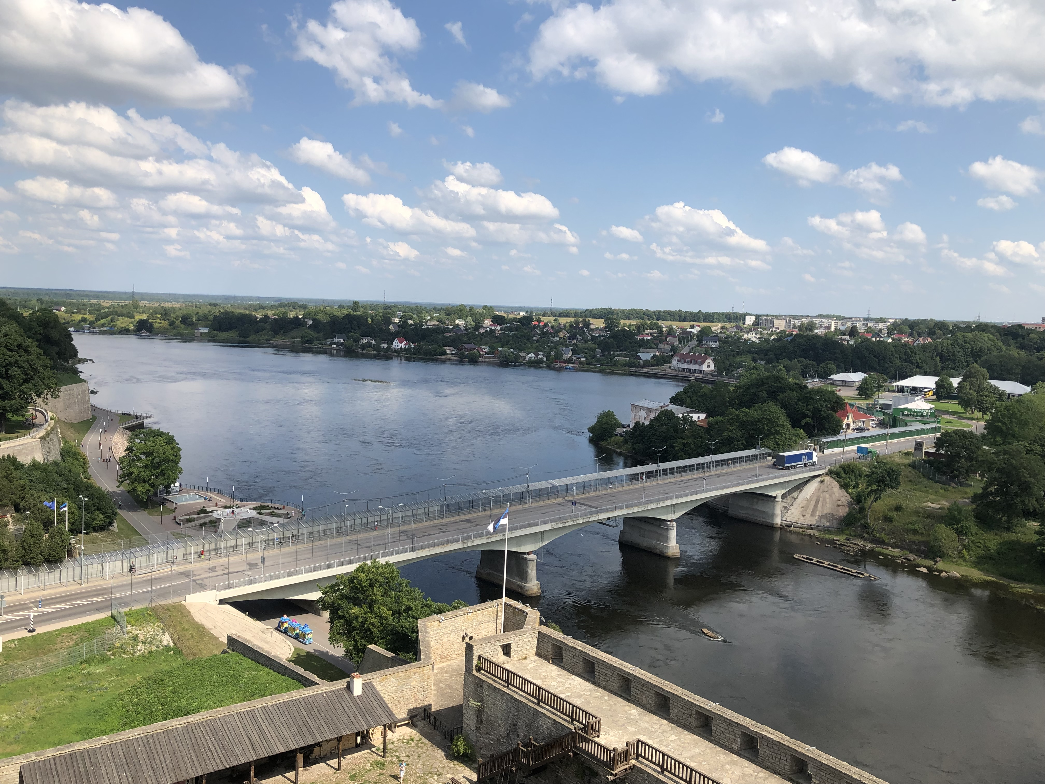 Narva sild 2019. aastal. Vaade Hermani tornist